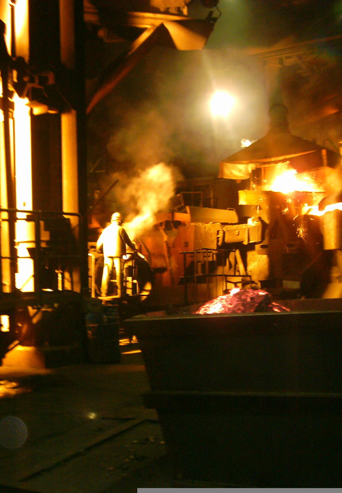 Giessvorgang bei einem Zulieferer für die Automobileindustrie